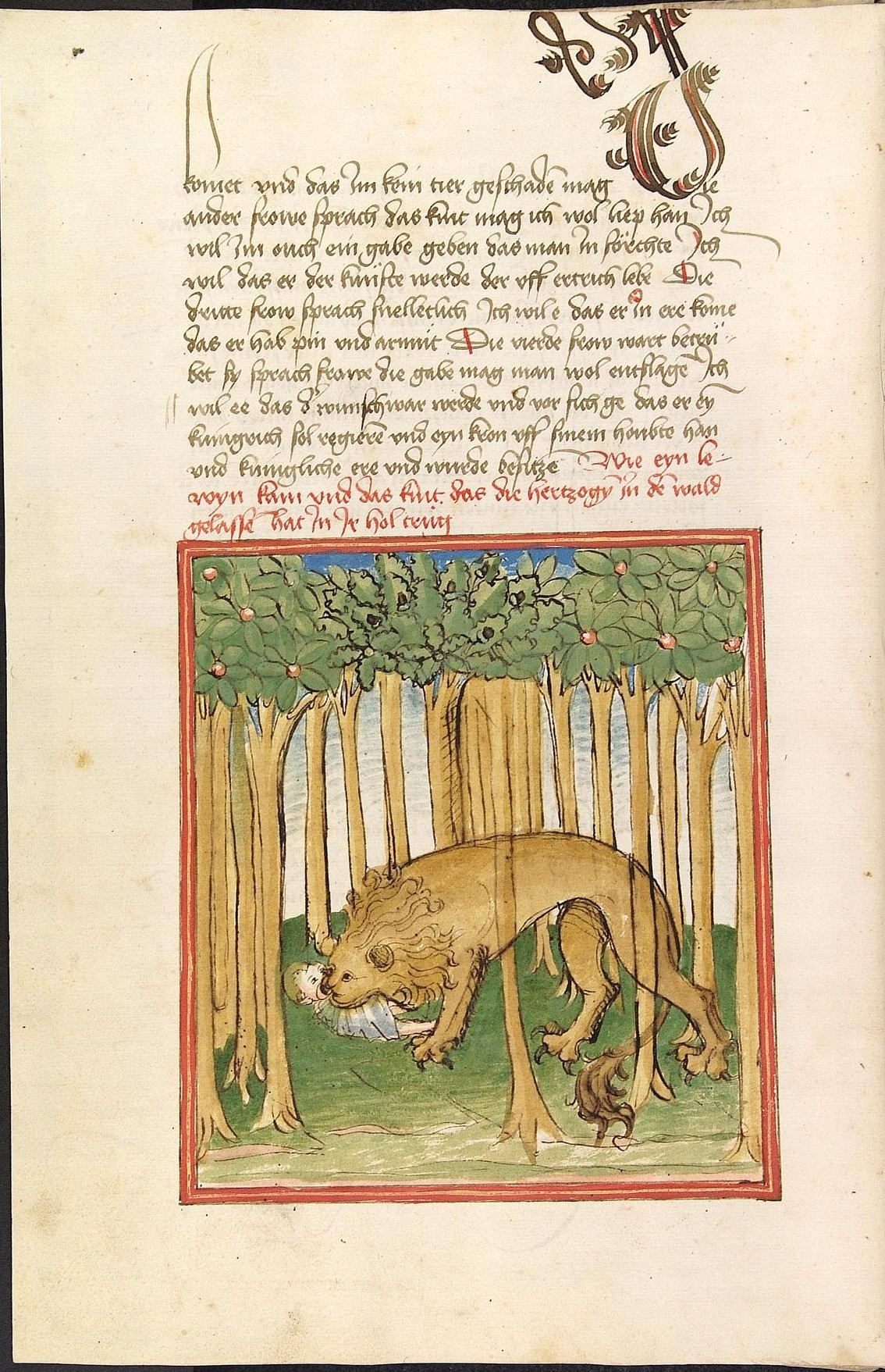 Codex Palatinus germanicus 152, Blatt 7v - Herpin - eine Löwin (in der Darstellung als männlicher Löwe mit Mähne) findet den neugeborenen Herzog, packt ihn mit dem Maul an der Windel und trägt ihn in ihre Höhle.